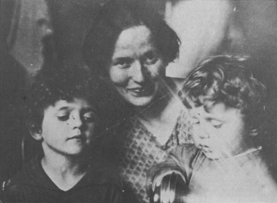 La femme de Antonio Gramsci, Julka Schucht, avec ses fils Delio et Giuliano